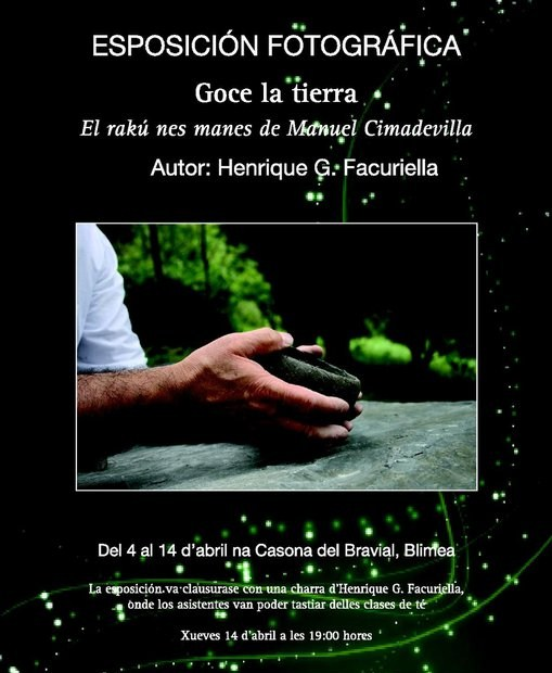 "Goce la tierra. El rakú nes manes de Manuel Cimadevilla"